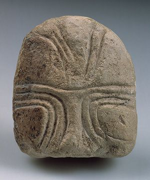 Mvskoke: λίθινη κεφαλή από το Αΐν Μαλλαχά